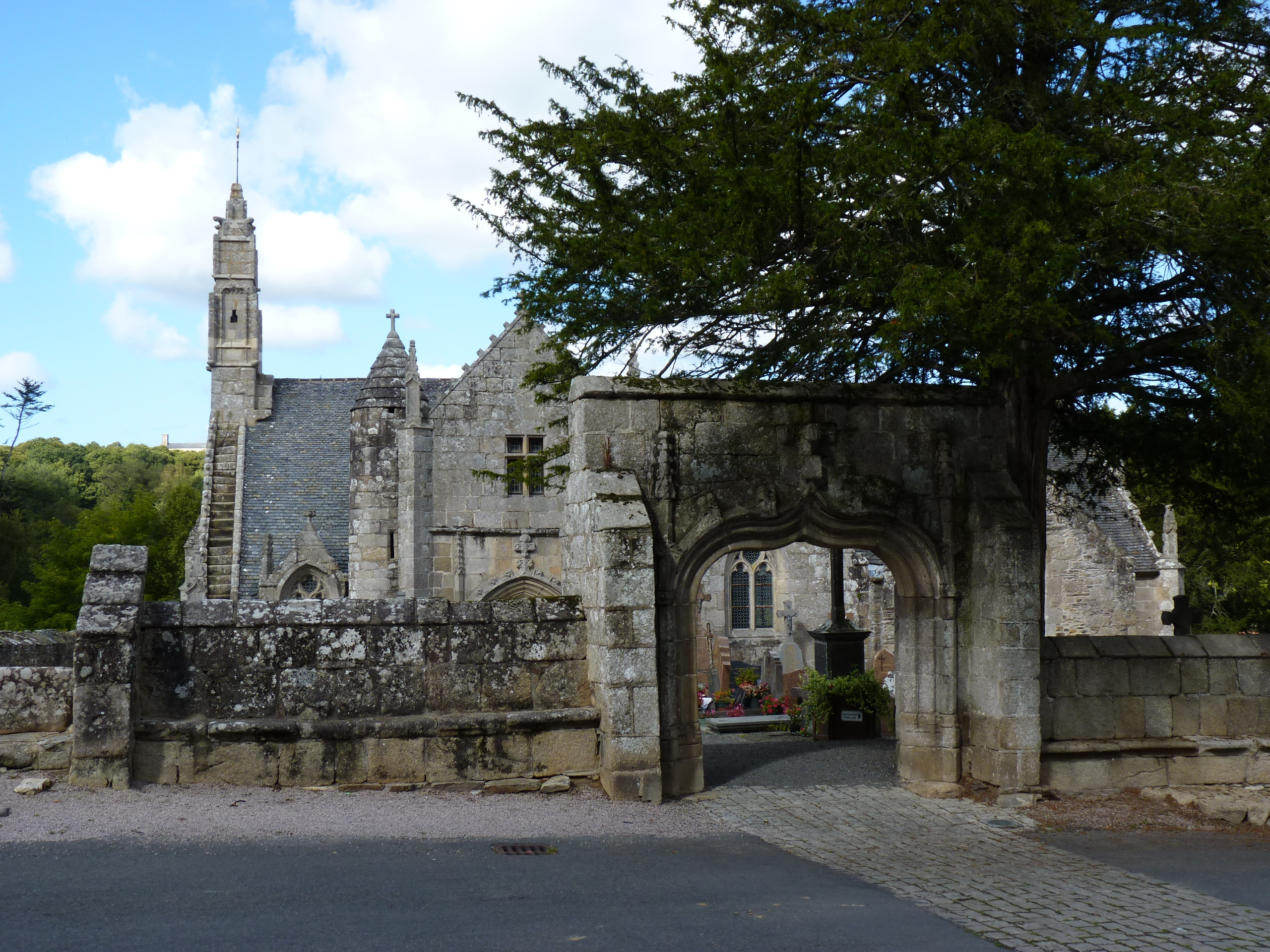 Église avec enclos et deux fontaines.